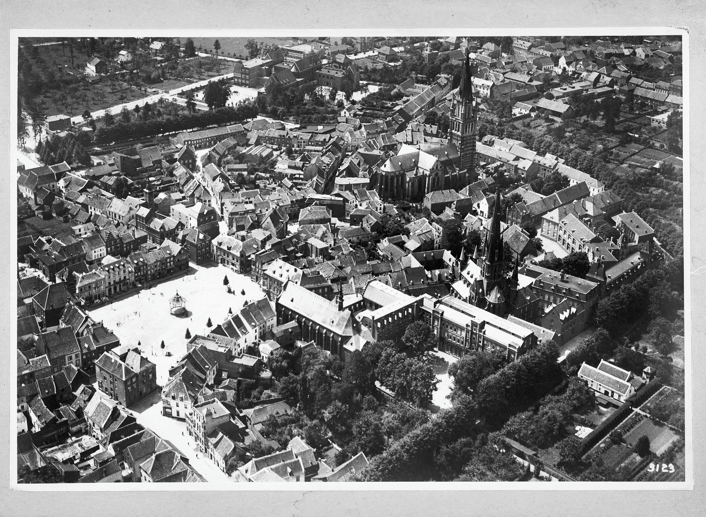 overzicht